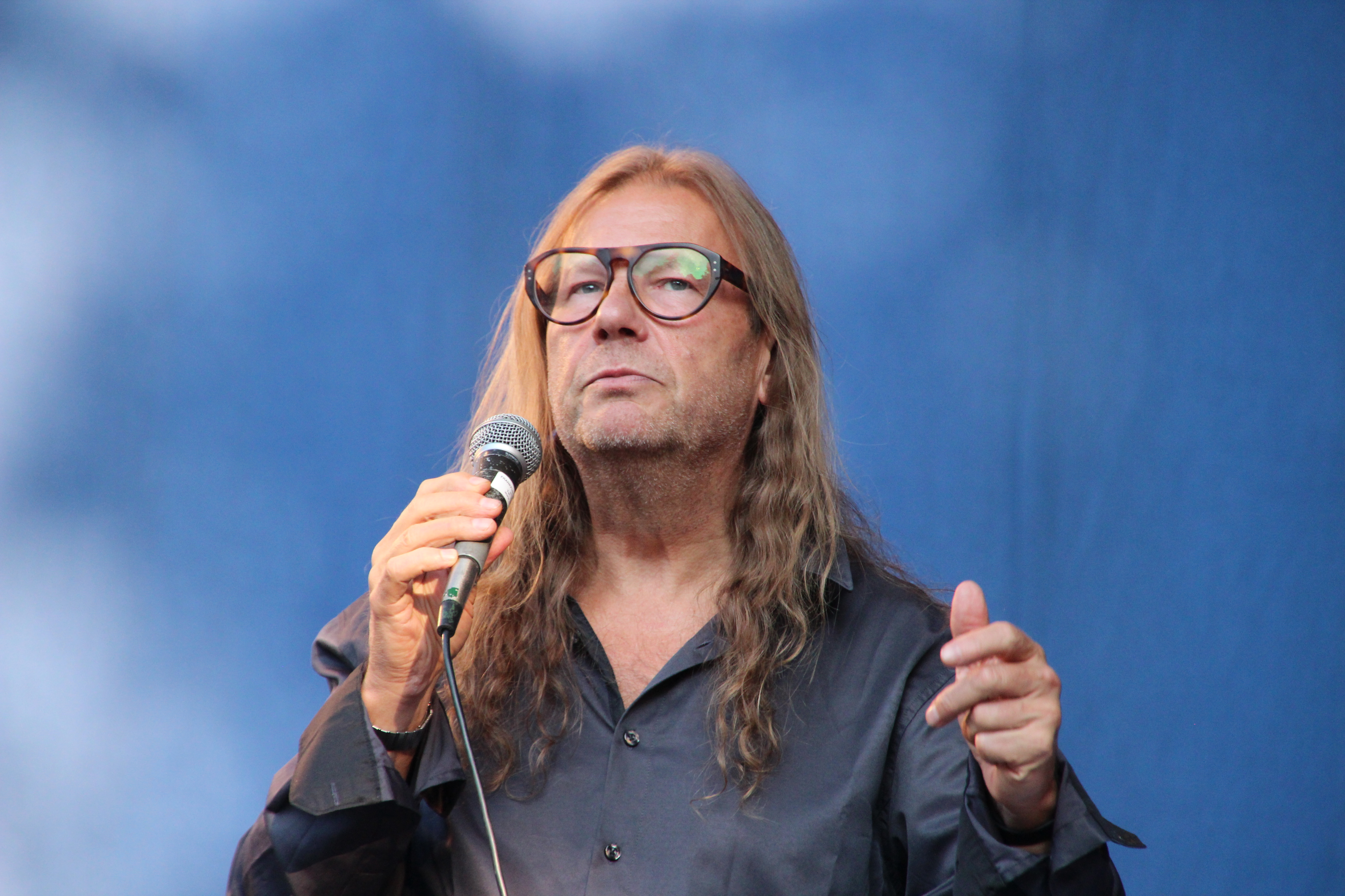 Bildinhalt: Vladyslav Sendecki bei einem Auftritt mit dem European Blue Note Quartet im Frankfurter Palmengarten Aufnahmeort: Frankfurt am Main, Deutschland Die dargestellte Person wurde bei einem öffentlichen Auftritt fotografiert.